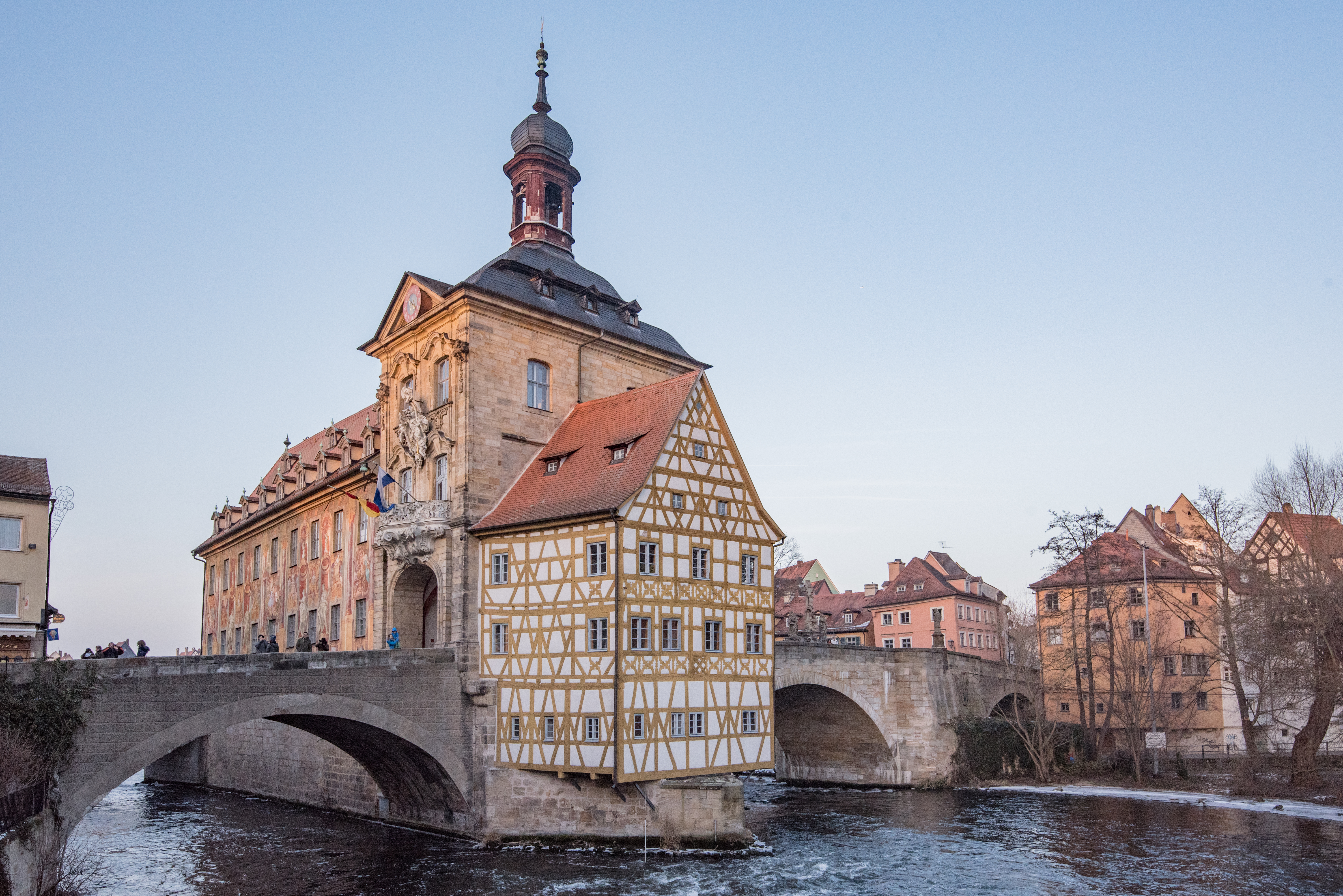 Bamberg, Altes Rathaus